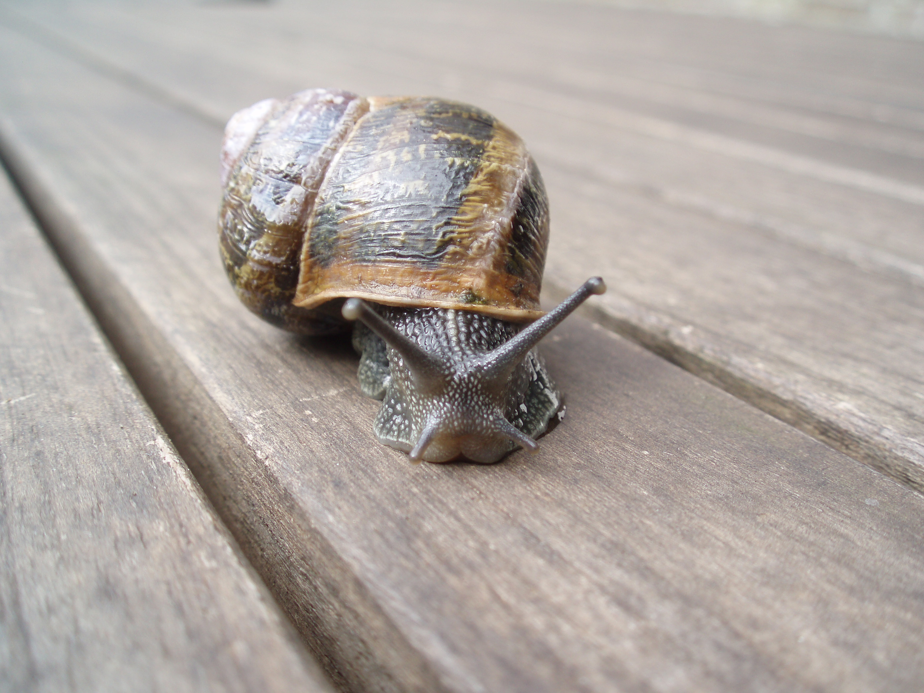 Kleine wijngaardslak.